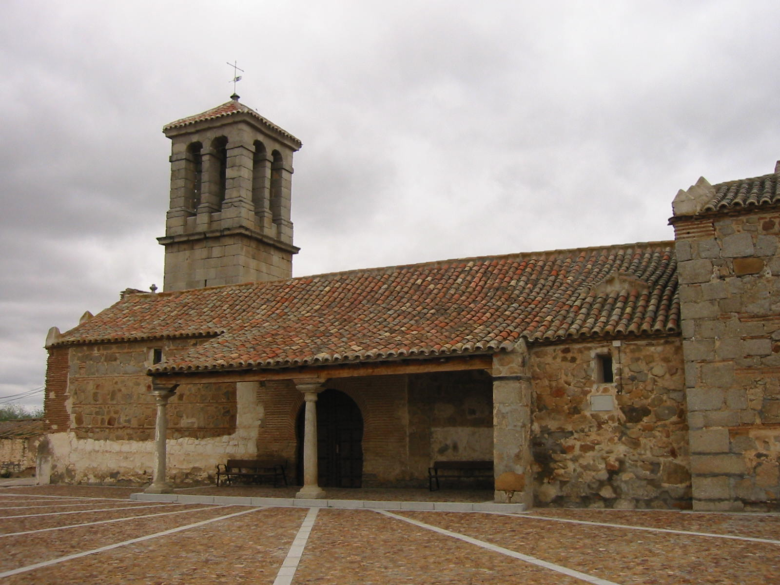 Iglesia parroquial de Casalgordo (Sonseca, Toledo)